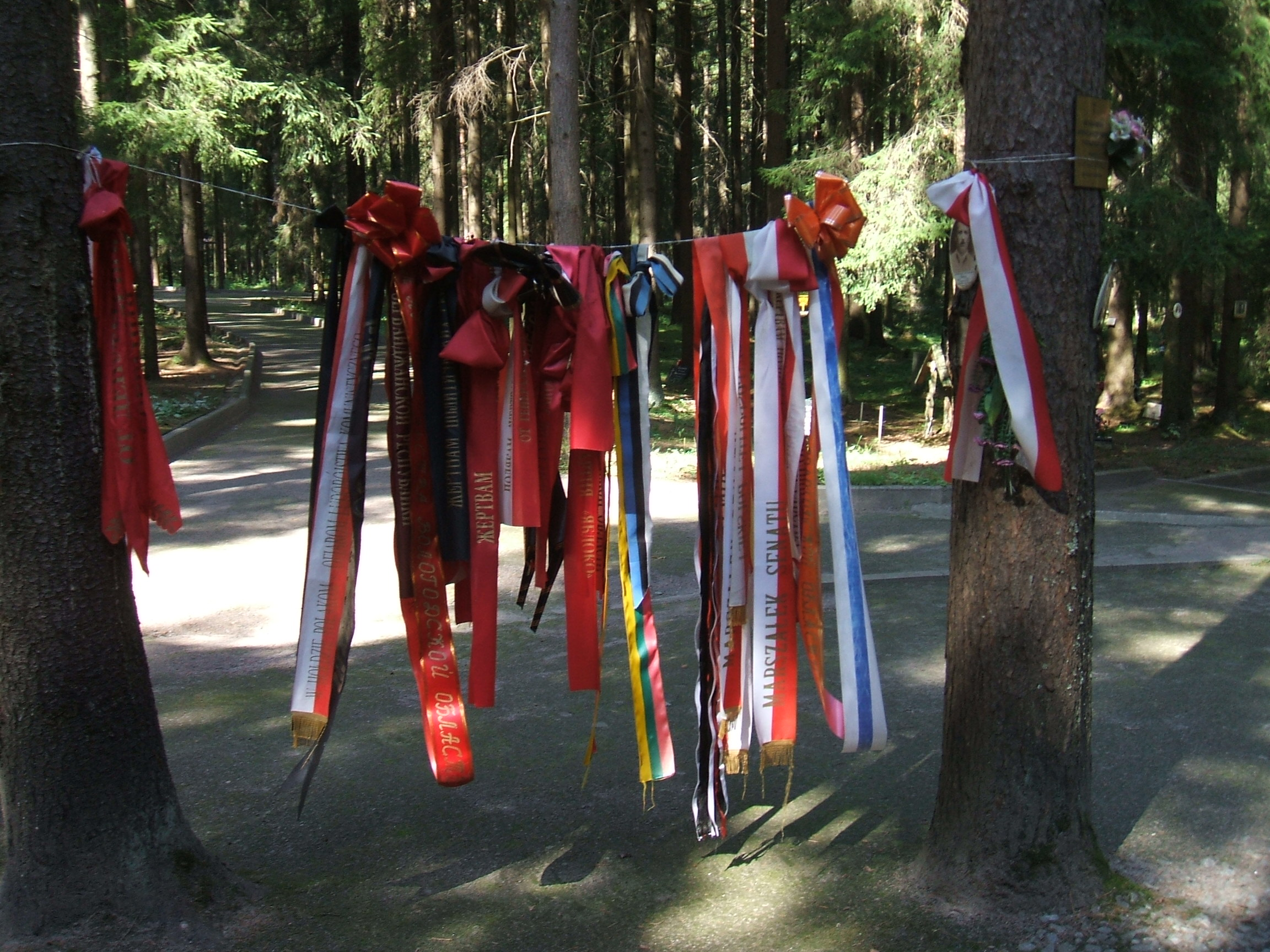 Левашовская пустошь СПб